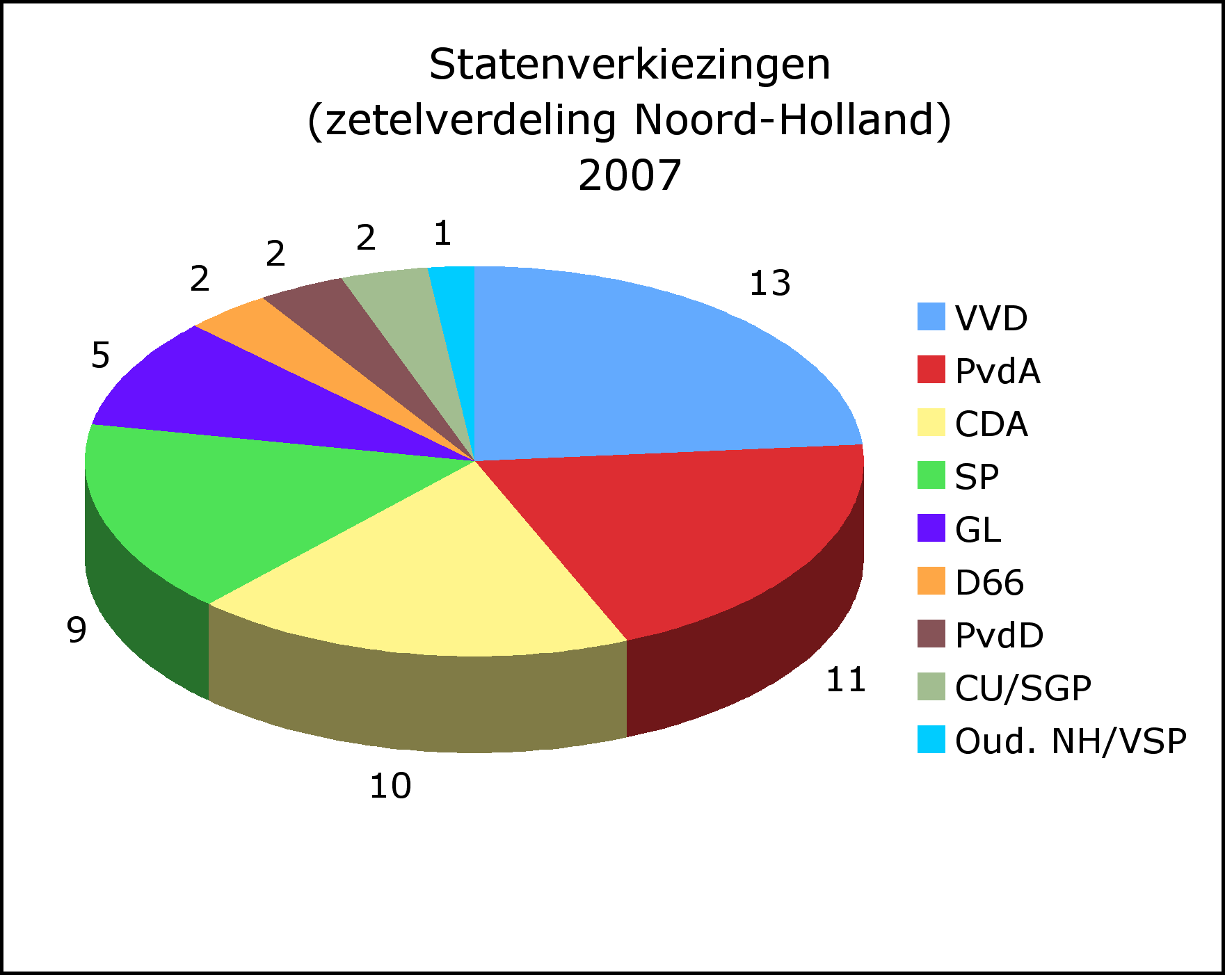 Uitslag provinciale statenverkiezingen Noord-Holland vertaald in zetels